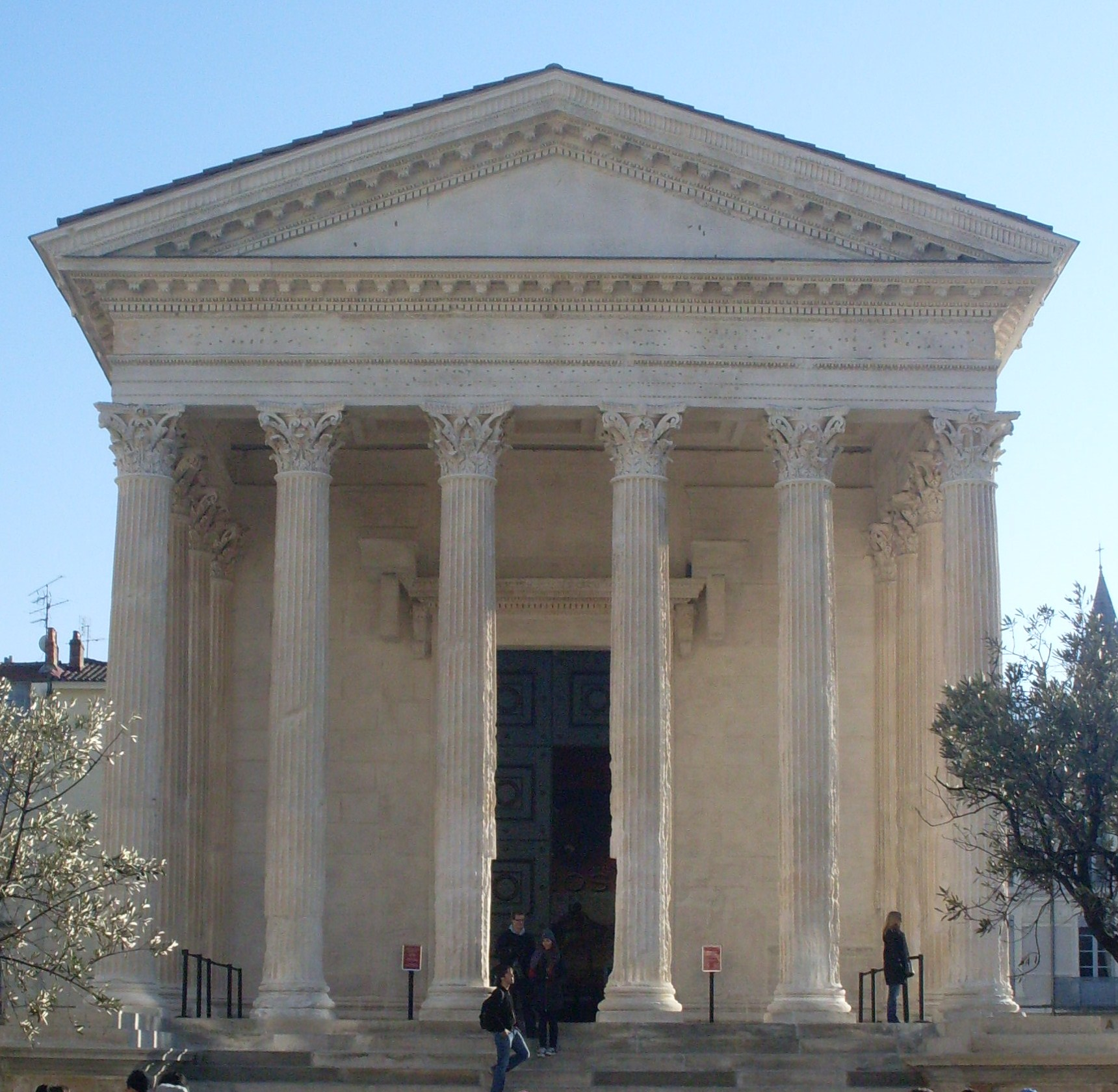 Photo de la maison carrée de Nîmes de face, datant de janvier 2011